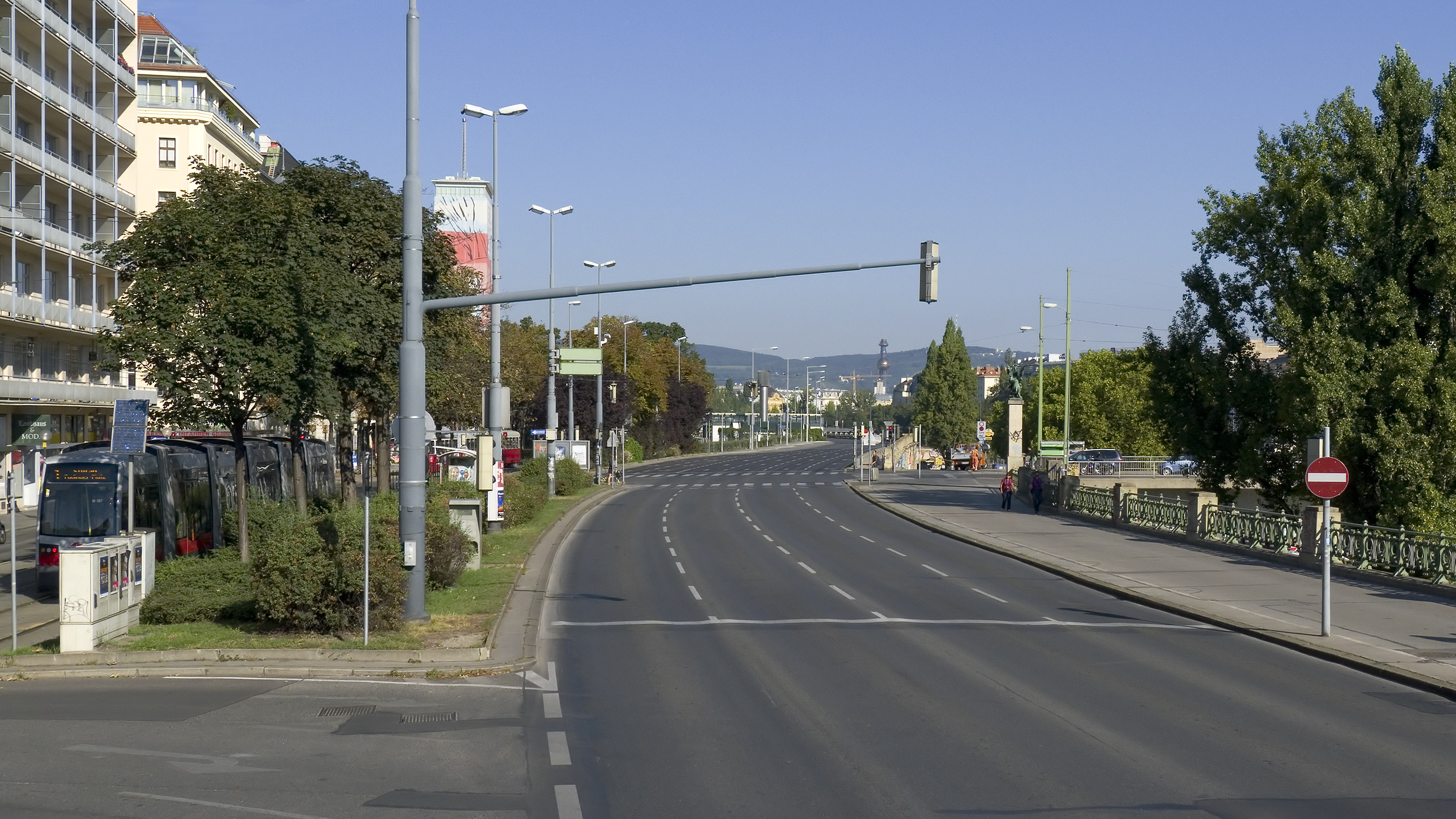 Franz-Josefs-Kai in Wien 1 bei Nr. 31 Richtung Norden